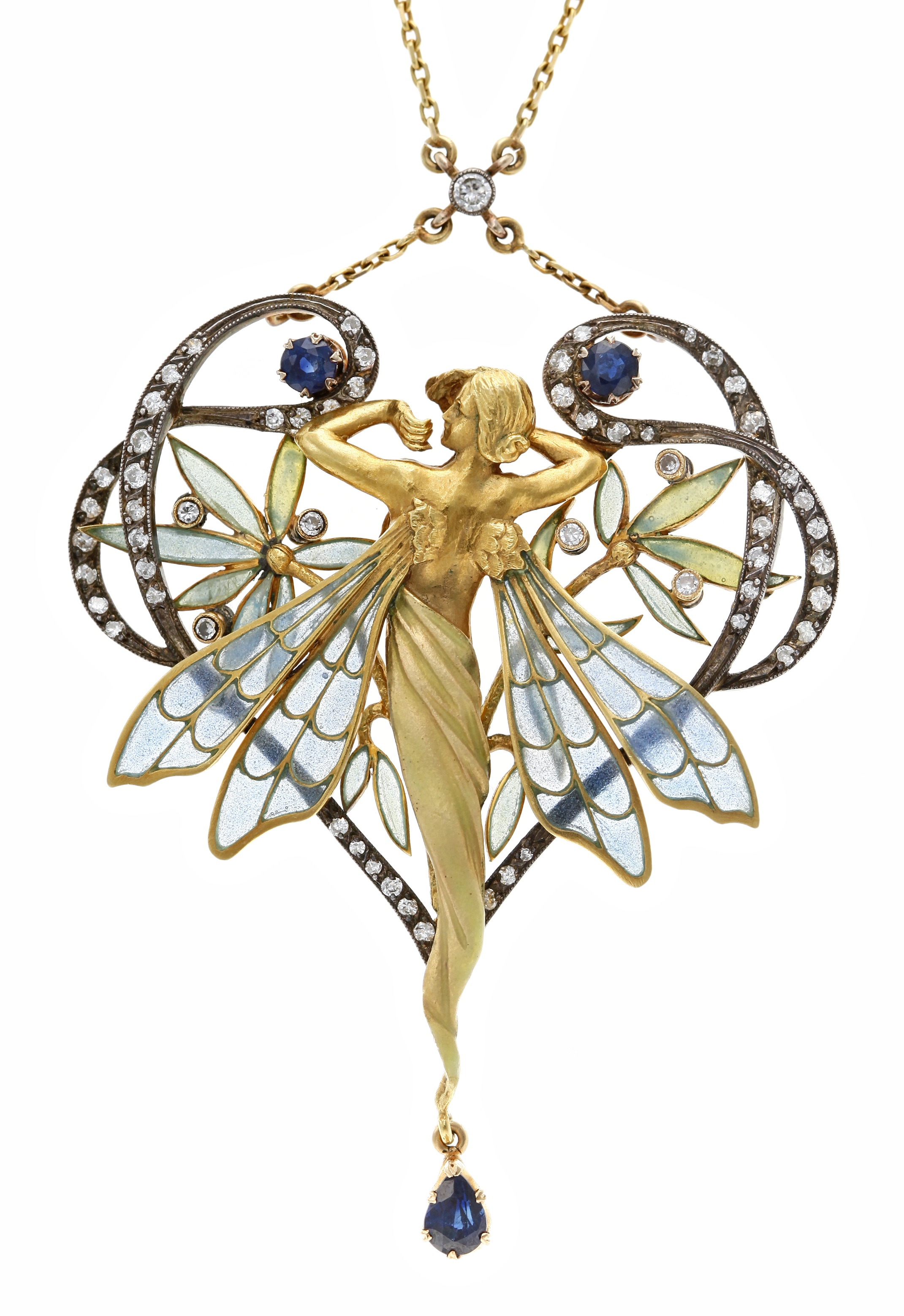 Collar d'or i plata, esmalt 'plique-à-jour' i 'basse taille', diamants talla brillant, 0,85 quilats i safirs talla brillant, 0,95 quilats. Signat 'Masriera i Carreras', amb punxó.